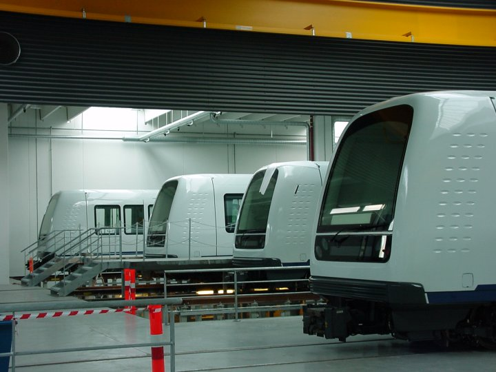 Metro-tog i remise